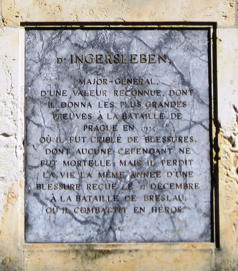 Gedenktafel für Johann Ludwig von Ingersleben (1703-1757) am Obelisken bei dem Schloss Rheinsberg